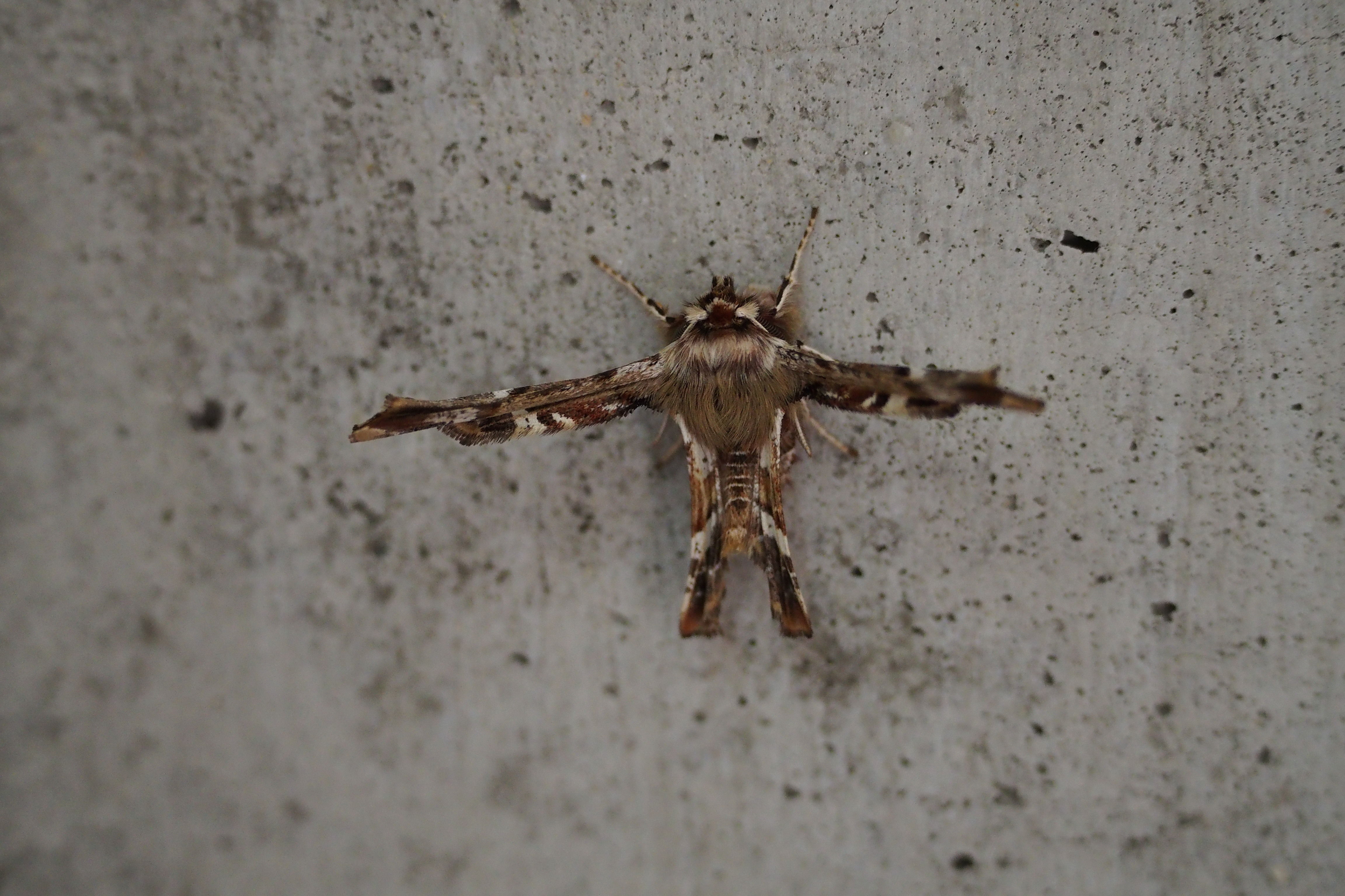 オカモトトゲエダシャク.